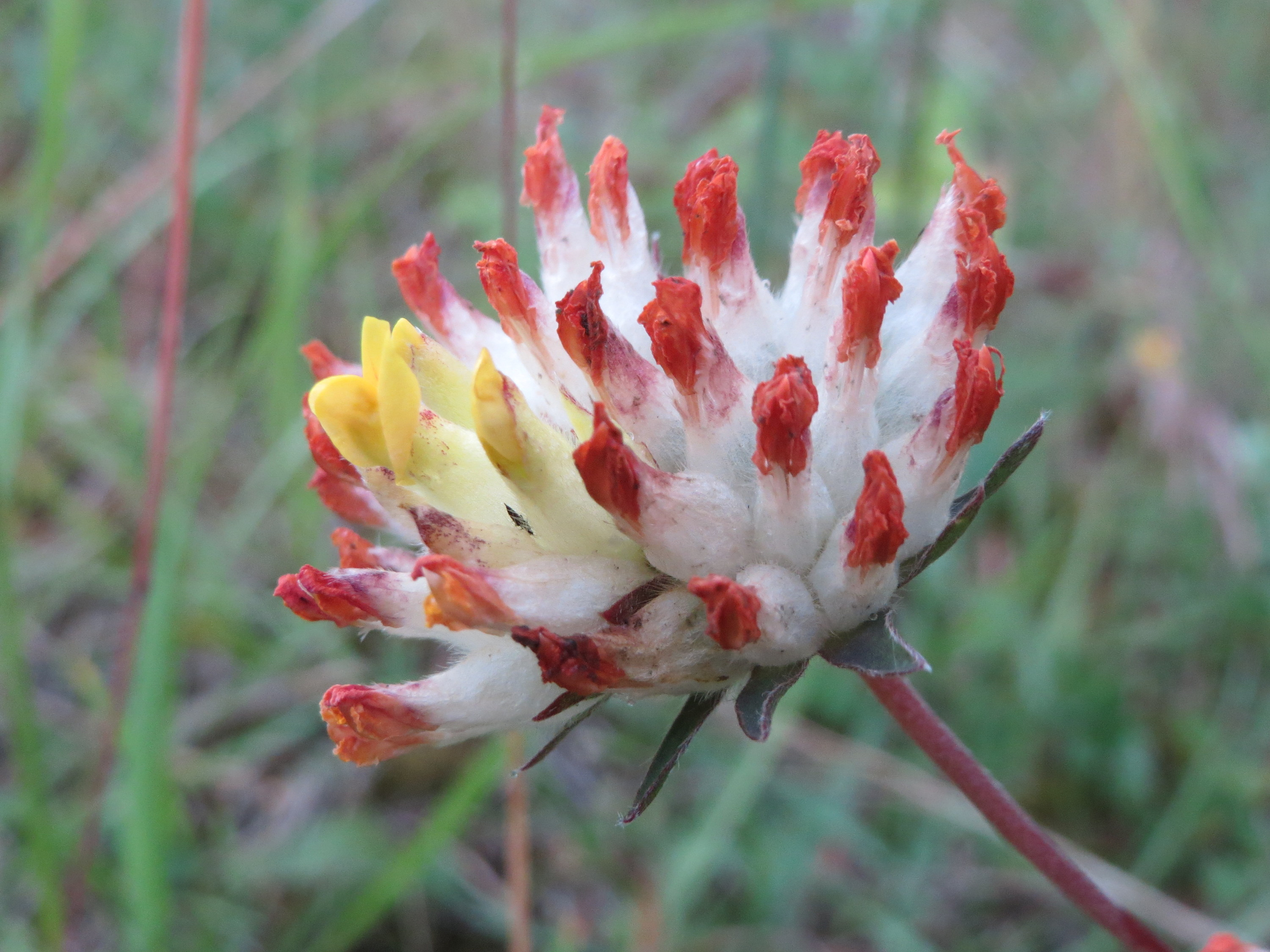 Echter Wundklee (Anthyllis vulneraria) im Naturschutzgebiet Birzberg